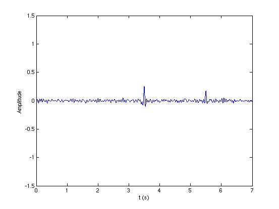 Compression d'impulsion sur Chirp_noise.jpg